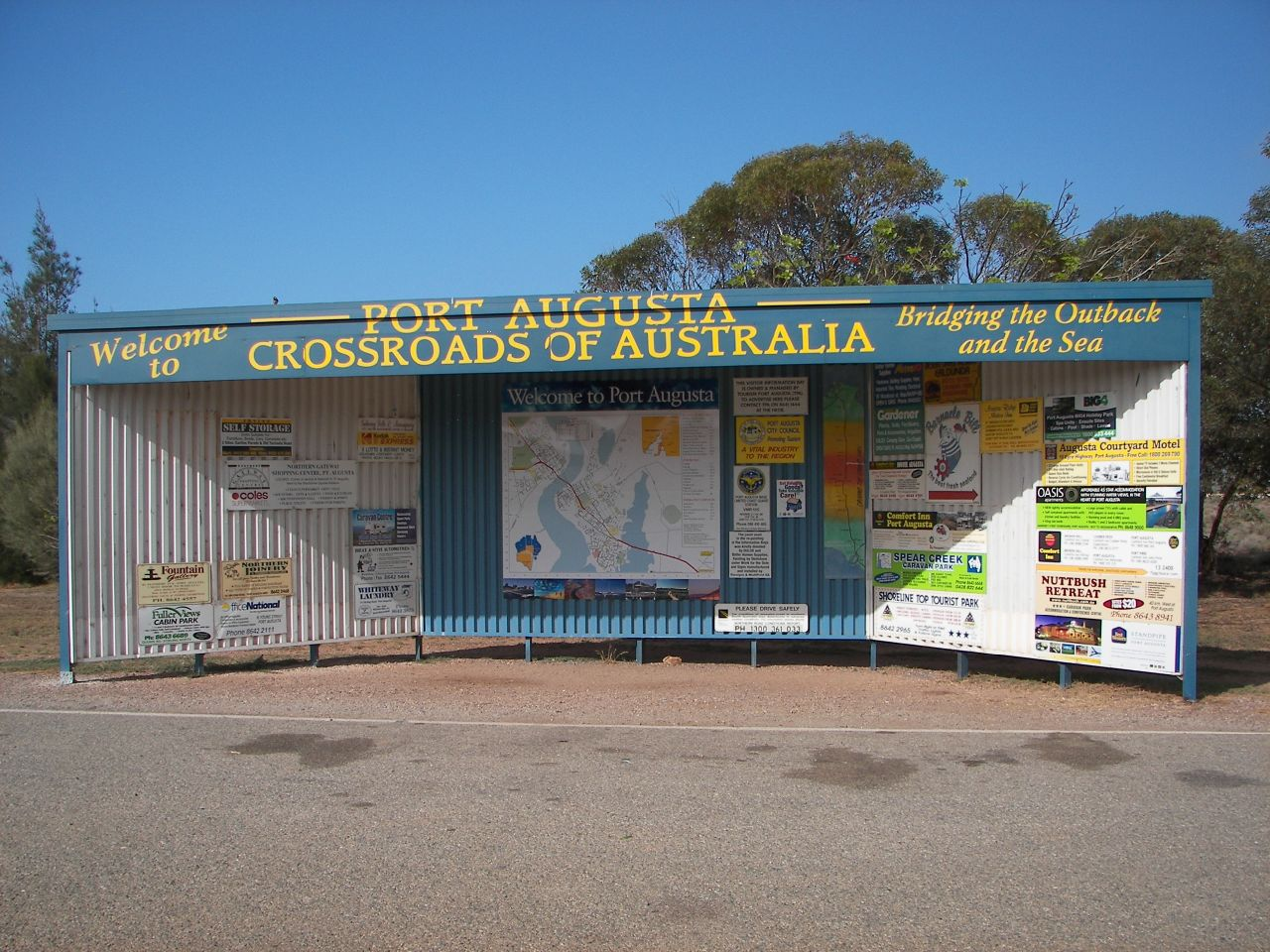 Arrivée à Port Augusta